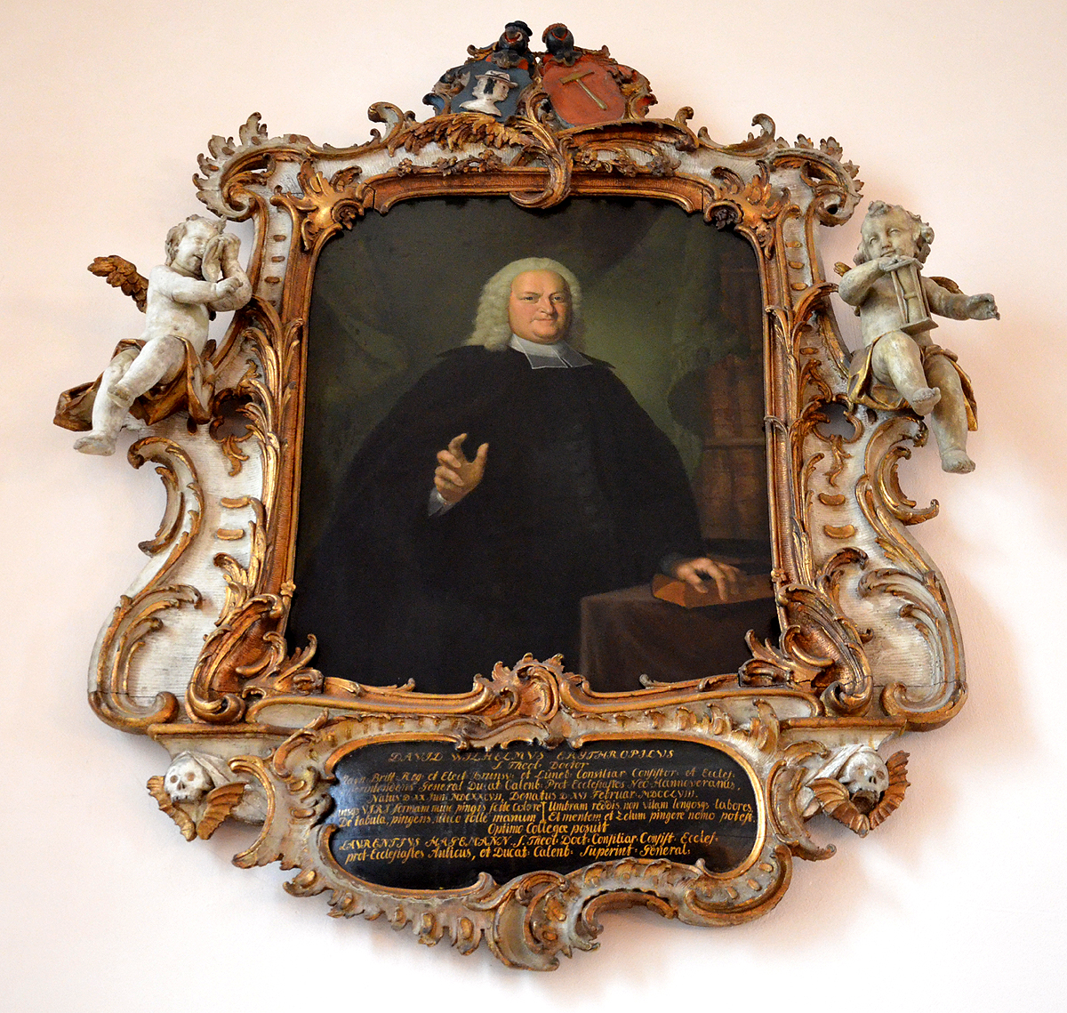 Ölgemälde mit dem Bildnis des lutherischen Theologen, Konsistorialrats und Generalsuperintendenten der Generaldiözese Calenberg David Wilhelm Erythropel in der Neustädter Kirche in Hannover; barocker, teils blattvergoldeter Prunkrahmen. mit Wappen, Putten und lateinischer Inschrift: ... Neustädter Kirche (Hannover)